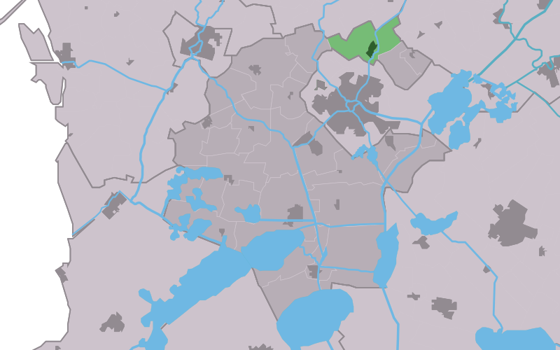 Kaartsje fan himrik fan Skearnegoutum